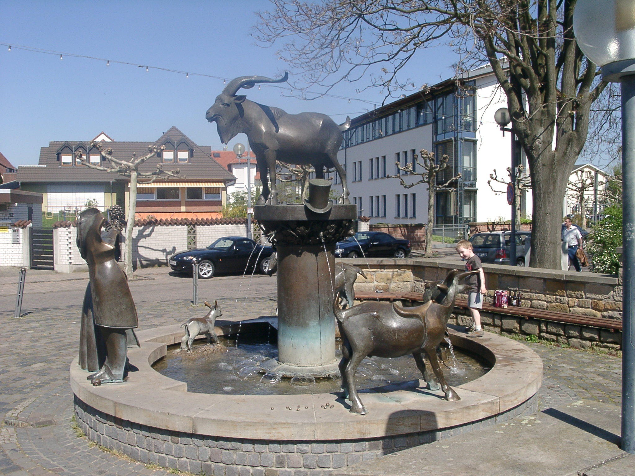 Zu sehen ist der Geißbockbrunnen am Deidesheimer Stadtplatz. Er thematisiert die Deidesheimer Geißbockversteigerung. Geschaffen wurde er 1985 vom pfälzischen Bildhauer Gernot Rumpf